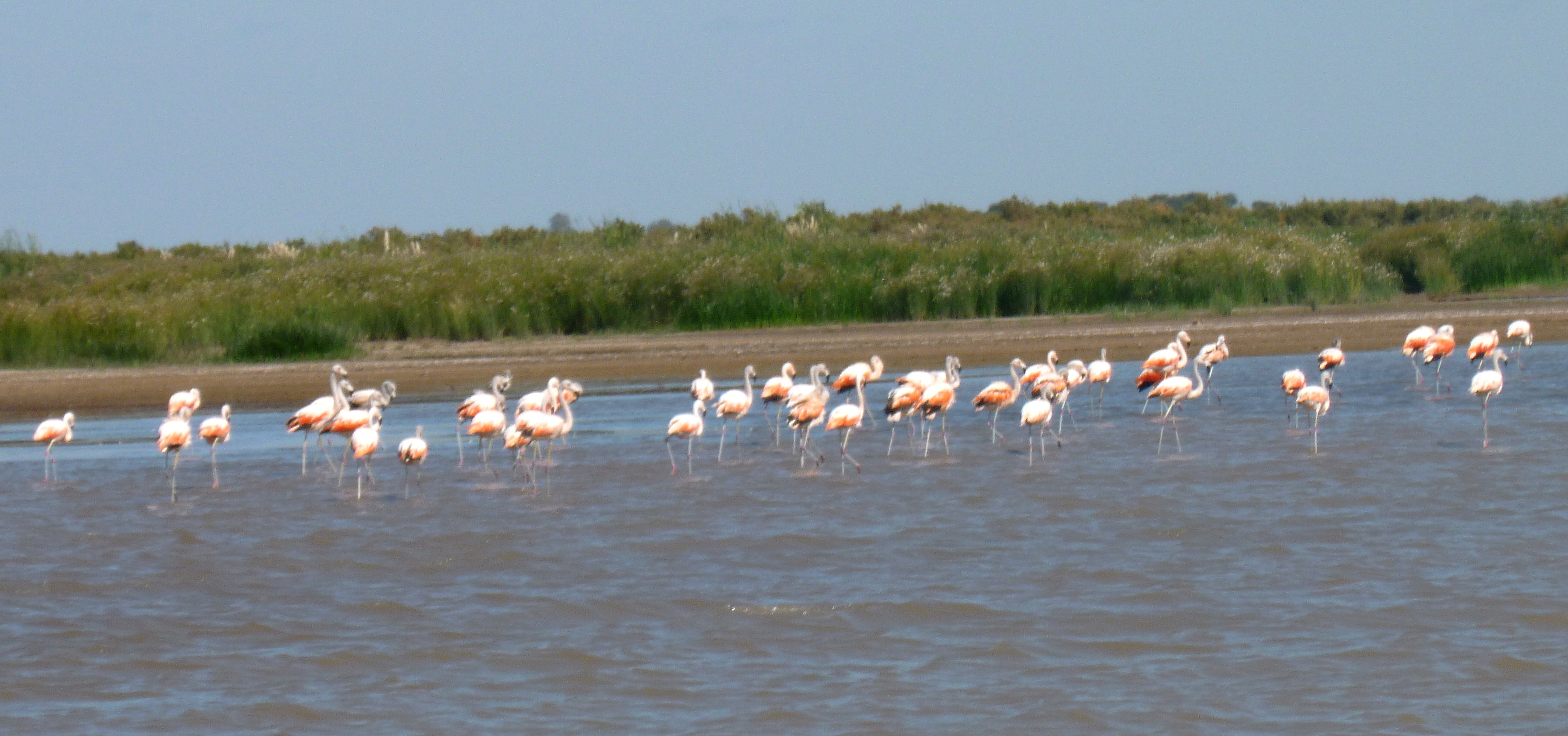 Flamencos comiendo en los Bañados del Rio Dulce y Laguna Mar Chiquita(Reserva Provincial de Cordoba-Argentina_Declarada sitio Ramsar